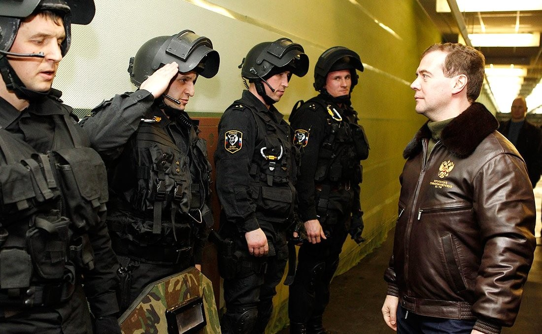 Президент РФ Дмитрий Медведев на базе ОМОН "Зубр"